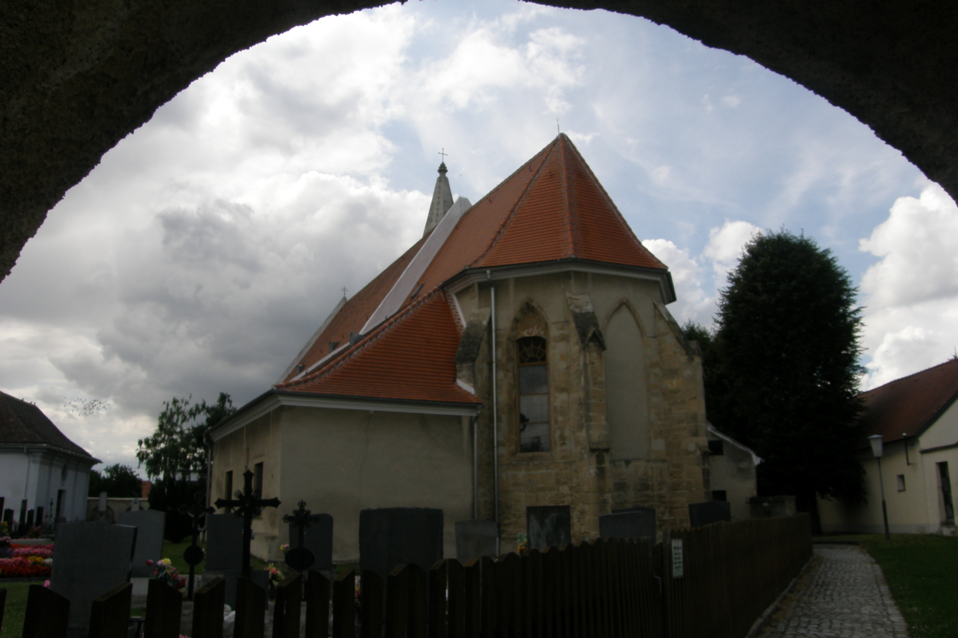 NÖ Walterskirchen, Kath. Pfarrkirche Maria Verkündigung und Friedhof